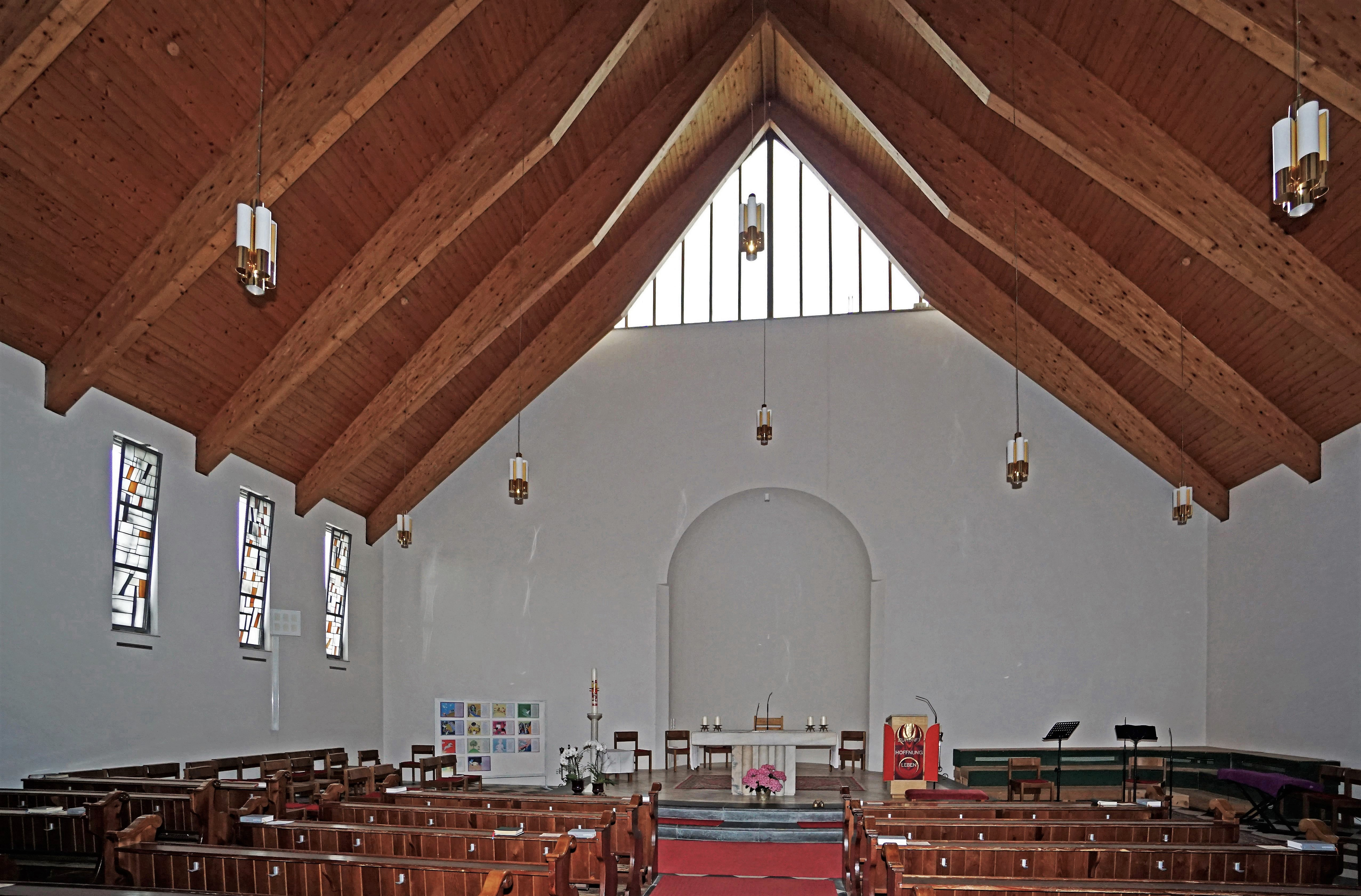 Stadtpfarrkirche Mariae Himmelfahrt (Maria Dorn), Innenansicht nach Westen